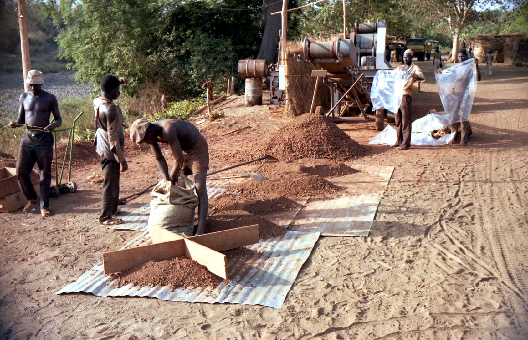 Großprobe Faleme